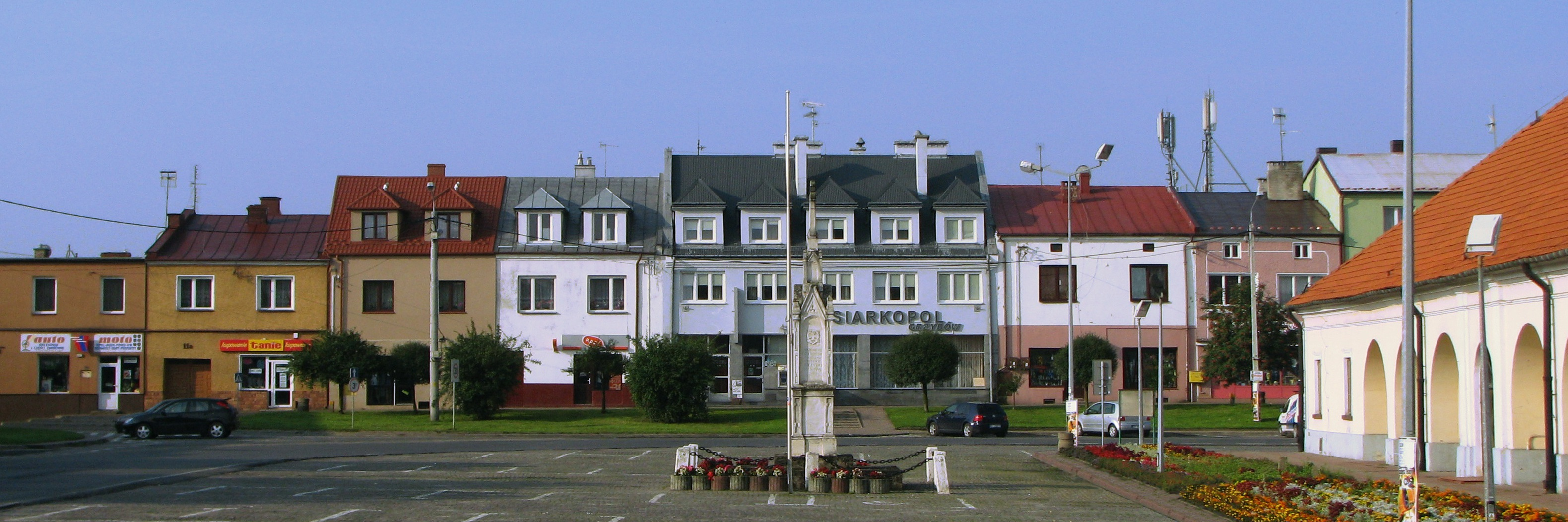 Kamienice na południowej pierzei rynku w Staszowie, Polska. W centrum pomnik Tadeusza Kościuszki, na prawo ratusz.